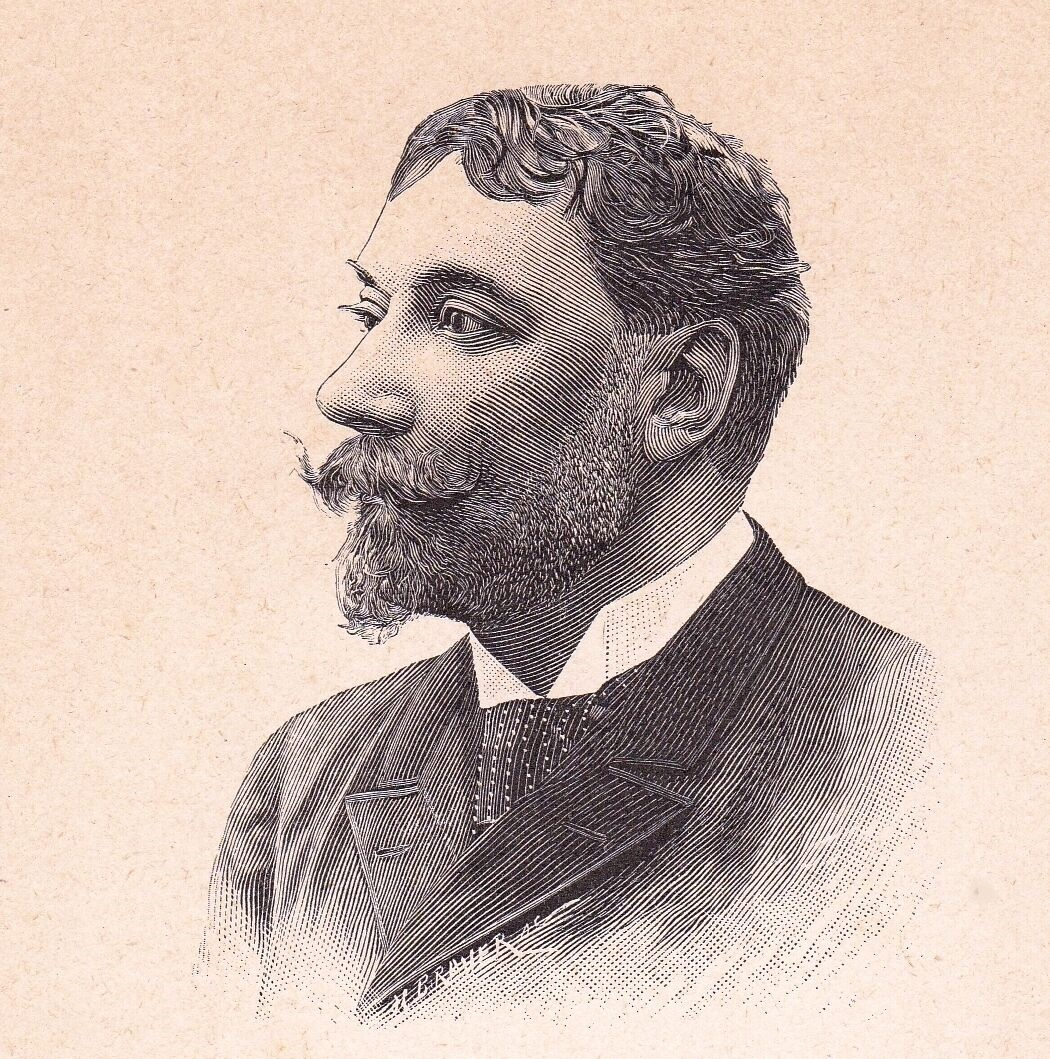 Emile Goudeau, écrivain